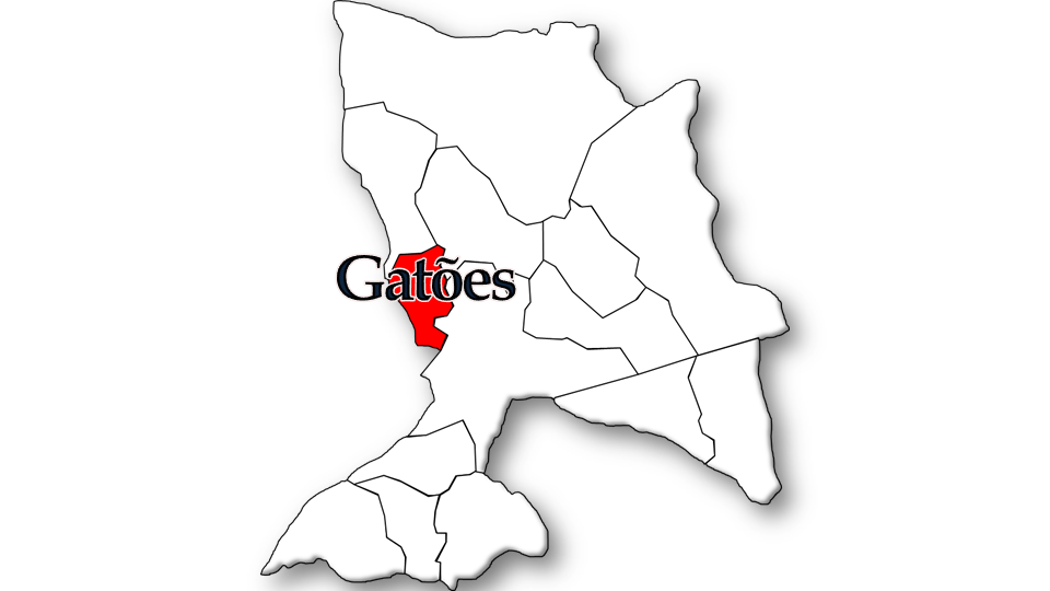 População